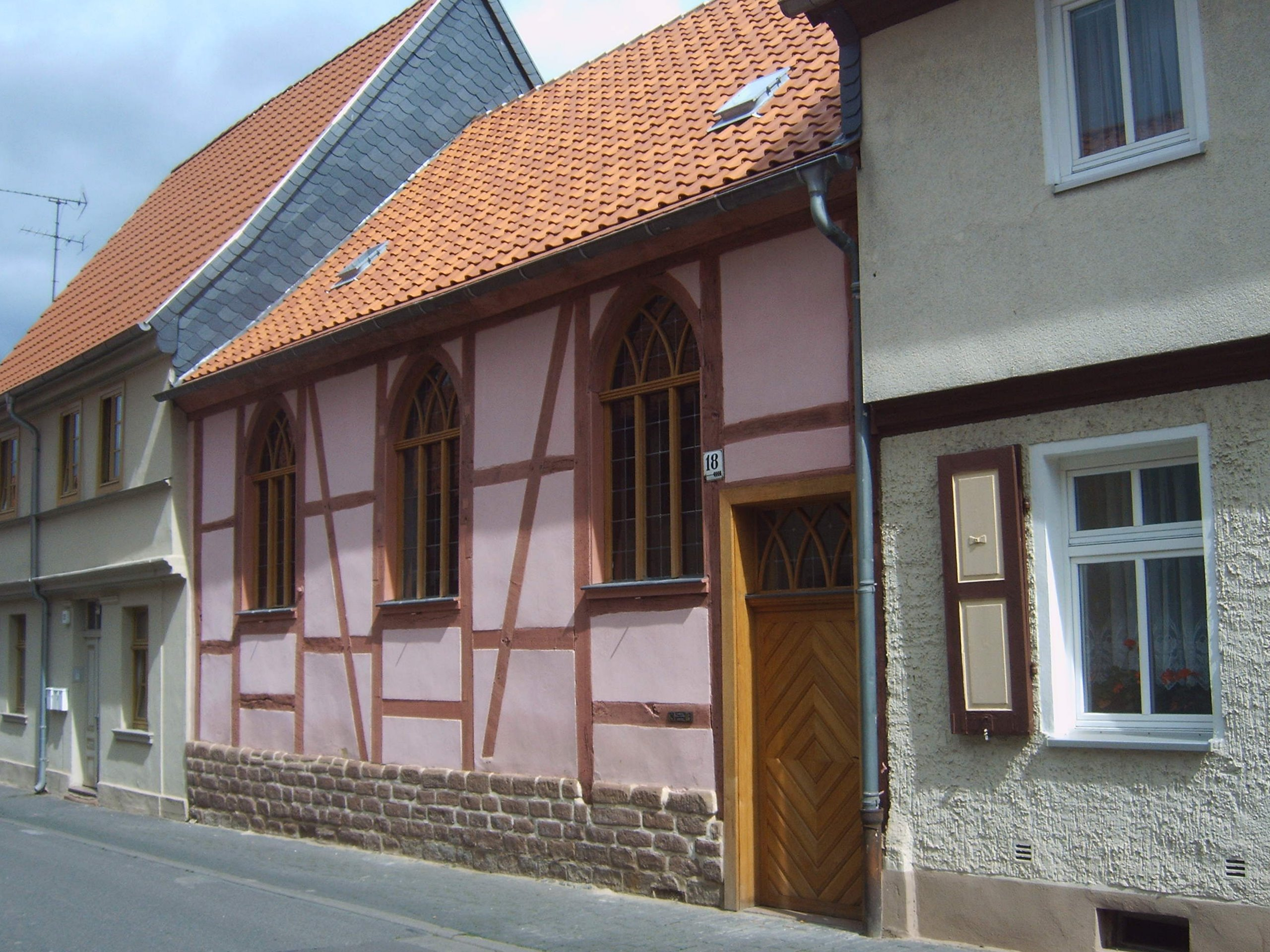 ehemalige Synagoge in Haldensleben, Sachsen-Anhalt, Deutschland